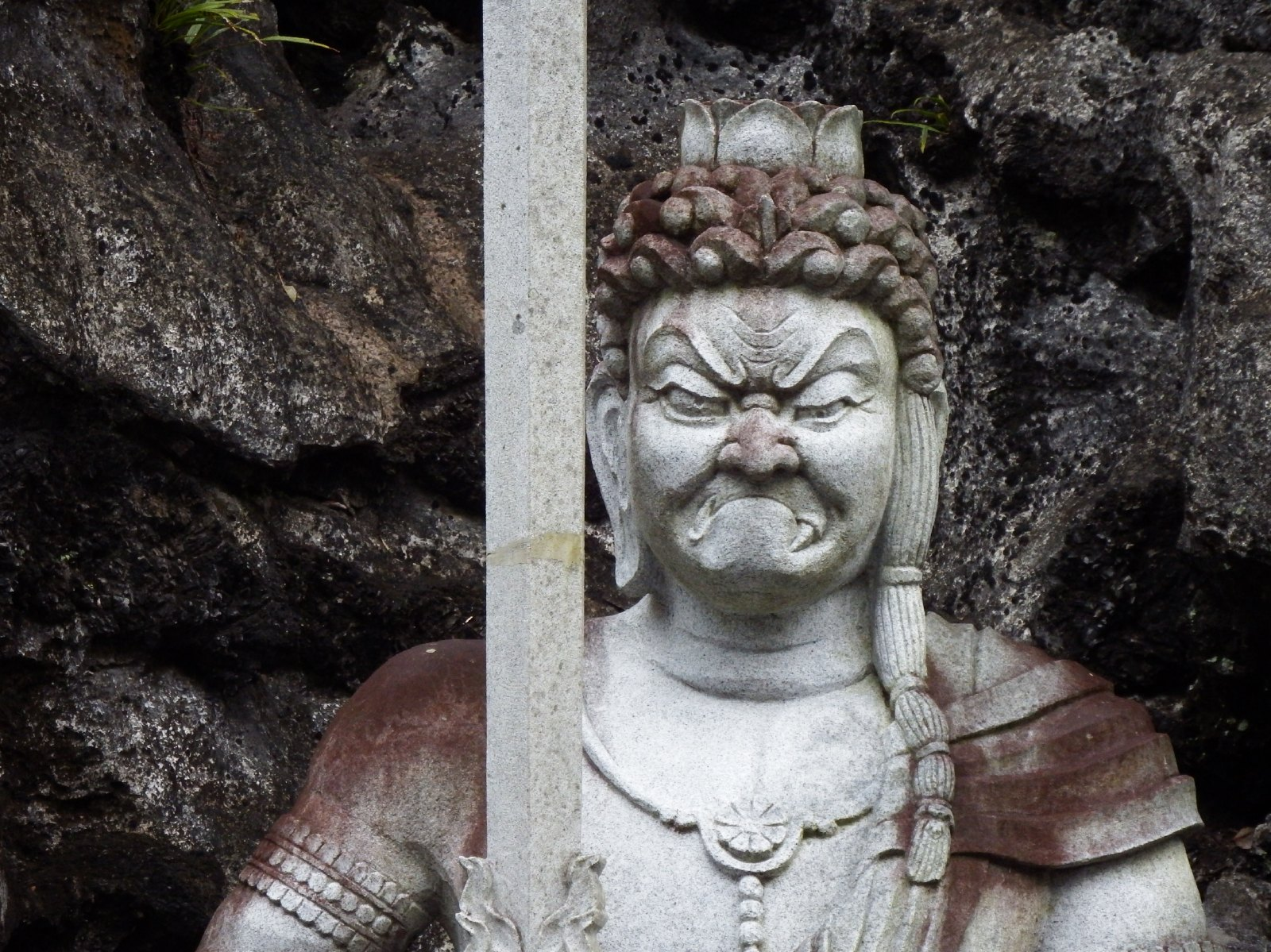 禅師峰寺の峰寺不動明王